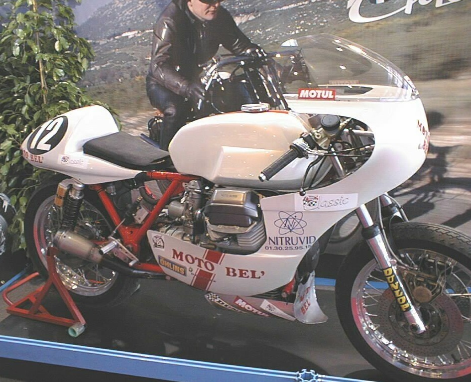 Guzzi Moto Bel' - Moto Revue Classic n° 12, victorieuse au Bol d'or classic 2003 sur le circuit de Nevers Magny-Cours, le lundi 14 juillet 2003, au cumul des 3 manches. Pilotes : Christophe Charles-Artigues et Daniel Moquet. Exposée au Mondial du deux roues de Paris en octobre 2003. Note : la Guzzi Moto Bel' - Moto Revue Classic n° 13, pilotée par Christophe Gaime et Éric Maurice, finit à la 7e place.